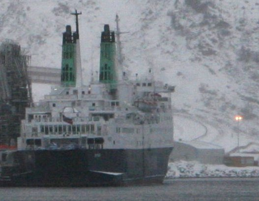 MS Jupiter som hotellskip ved Melkøya februar 2006